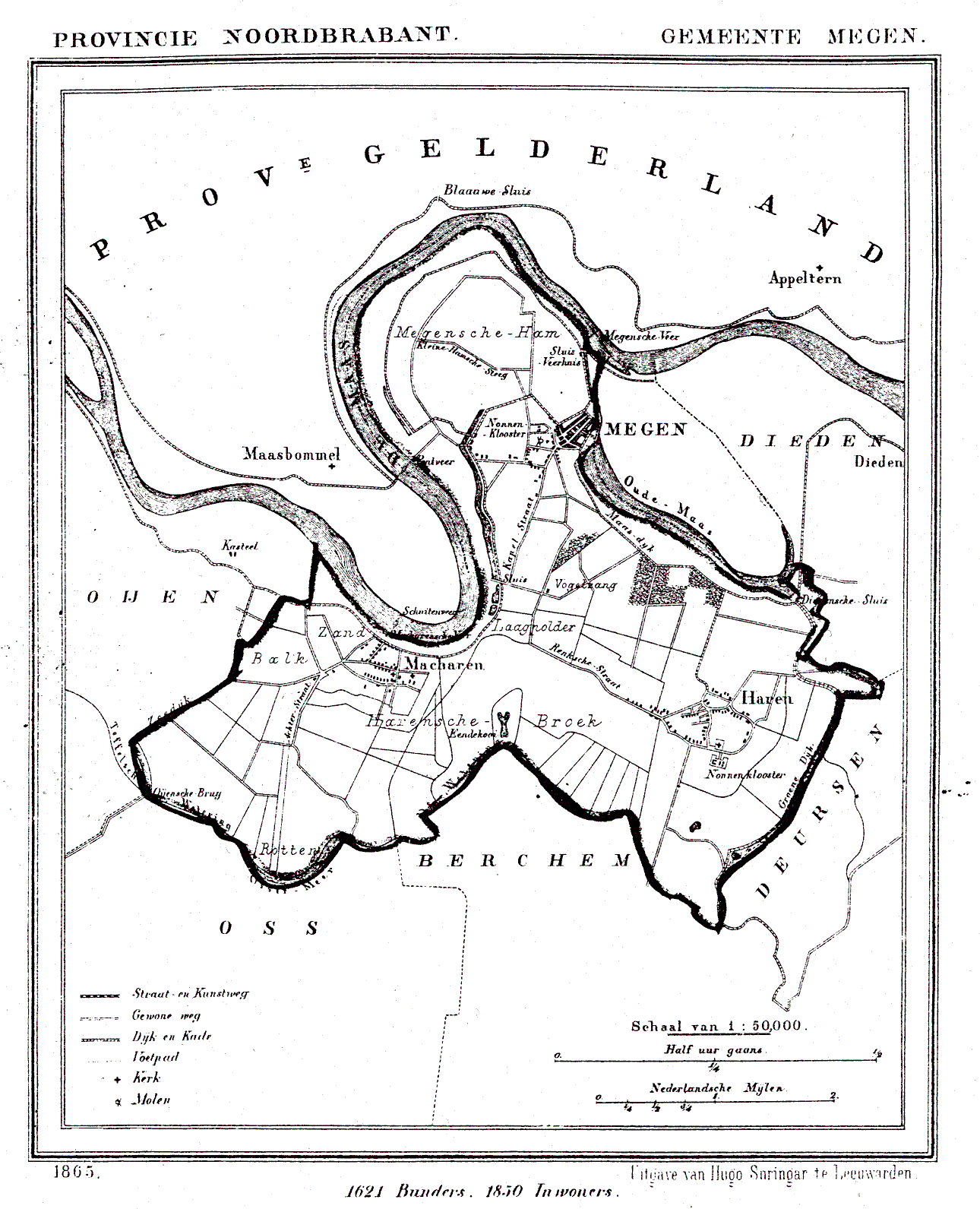 Nederland, Noord-Brabant, Gemeente Megen